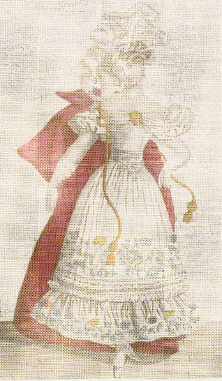 Пример использования Аграманта - узорчатое плетение из цветного или одноцветного шнура в виде длинной ленты